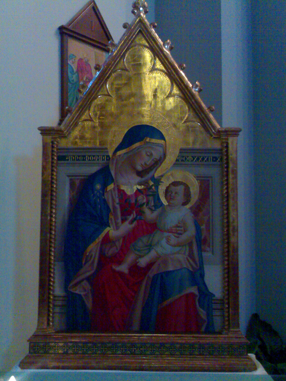 Dipinto Madonna Regina della Pace nella Chiesa del Sacro Cuore di Montepulciano Stazione (Siena)